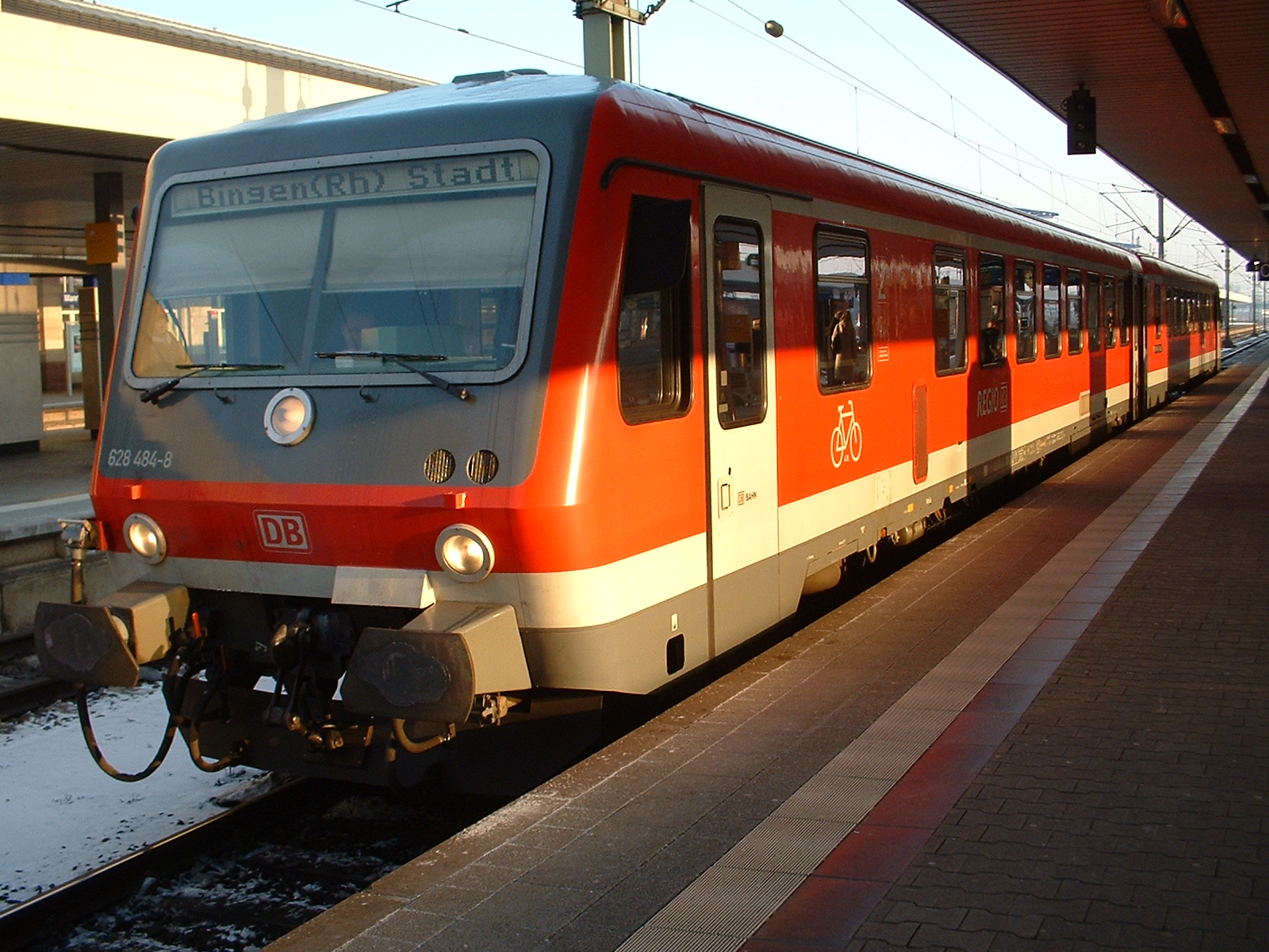 VT 628 der Rheinhessenbahn in Mannheim Hbf